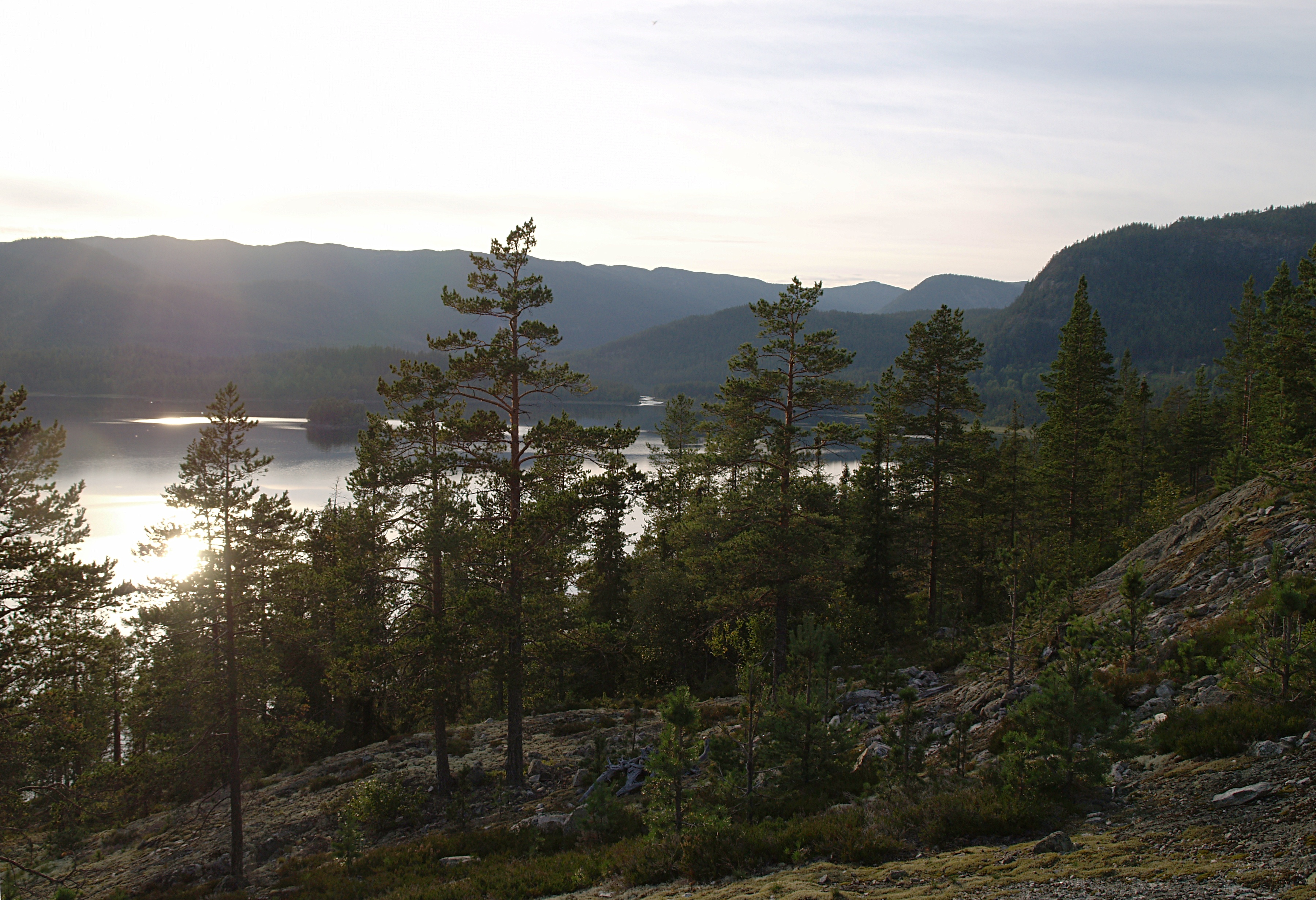 Nevlingen i Vassfaret